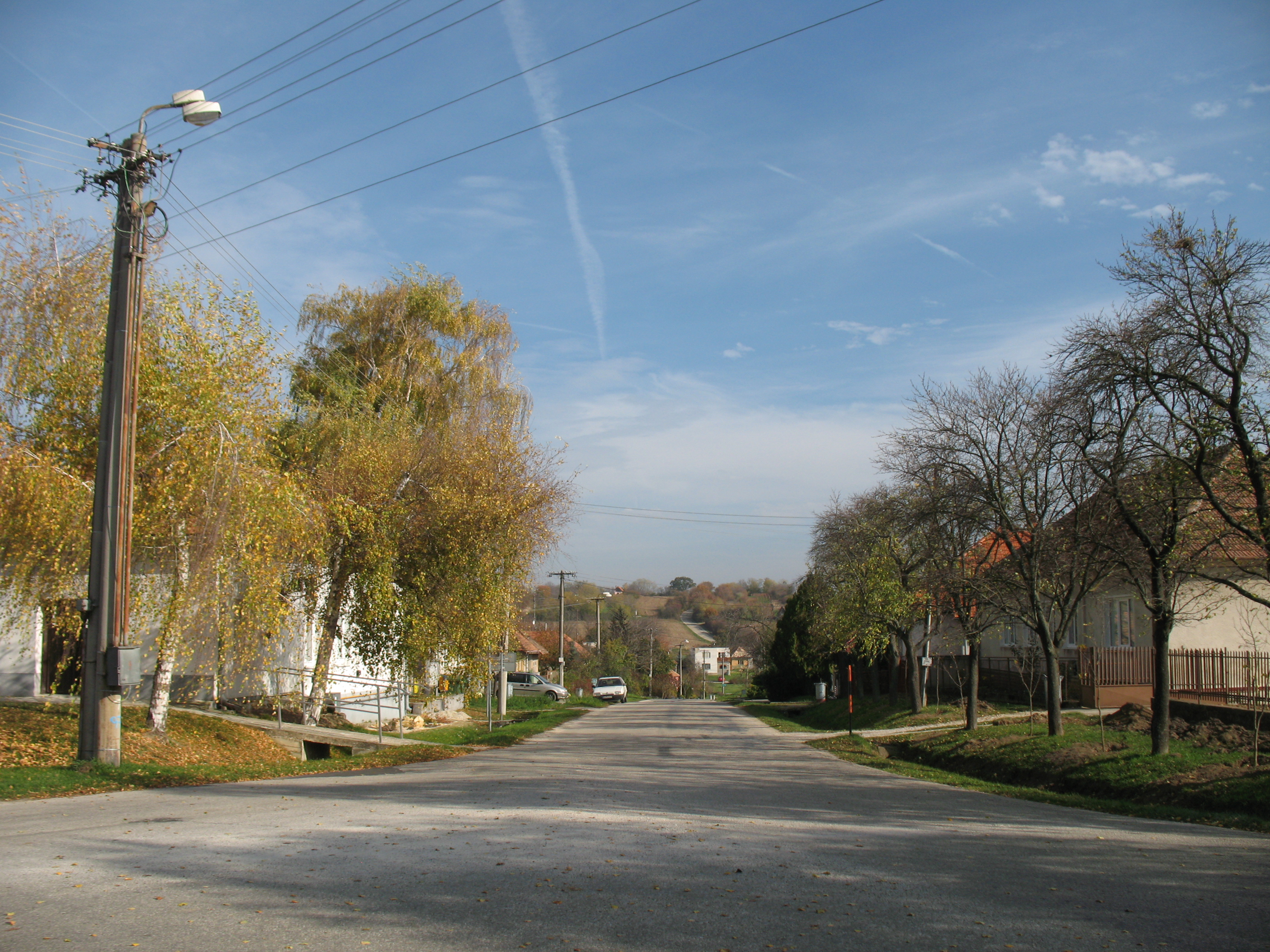 Nagyhind